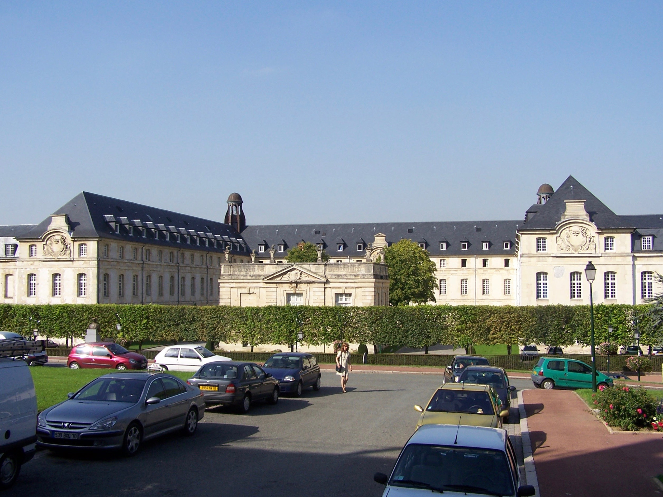 École militaire de Saint-Cyr-l'École (Yvelines, France). Photo personnelle Military school of Saint-Cyr-l'École (Yvelines, France). Personal picture. Auteur/Author : ℍenry Salomé